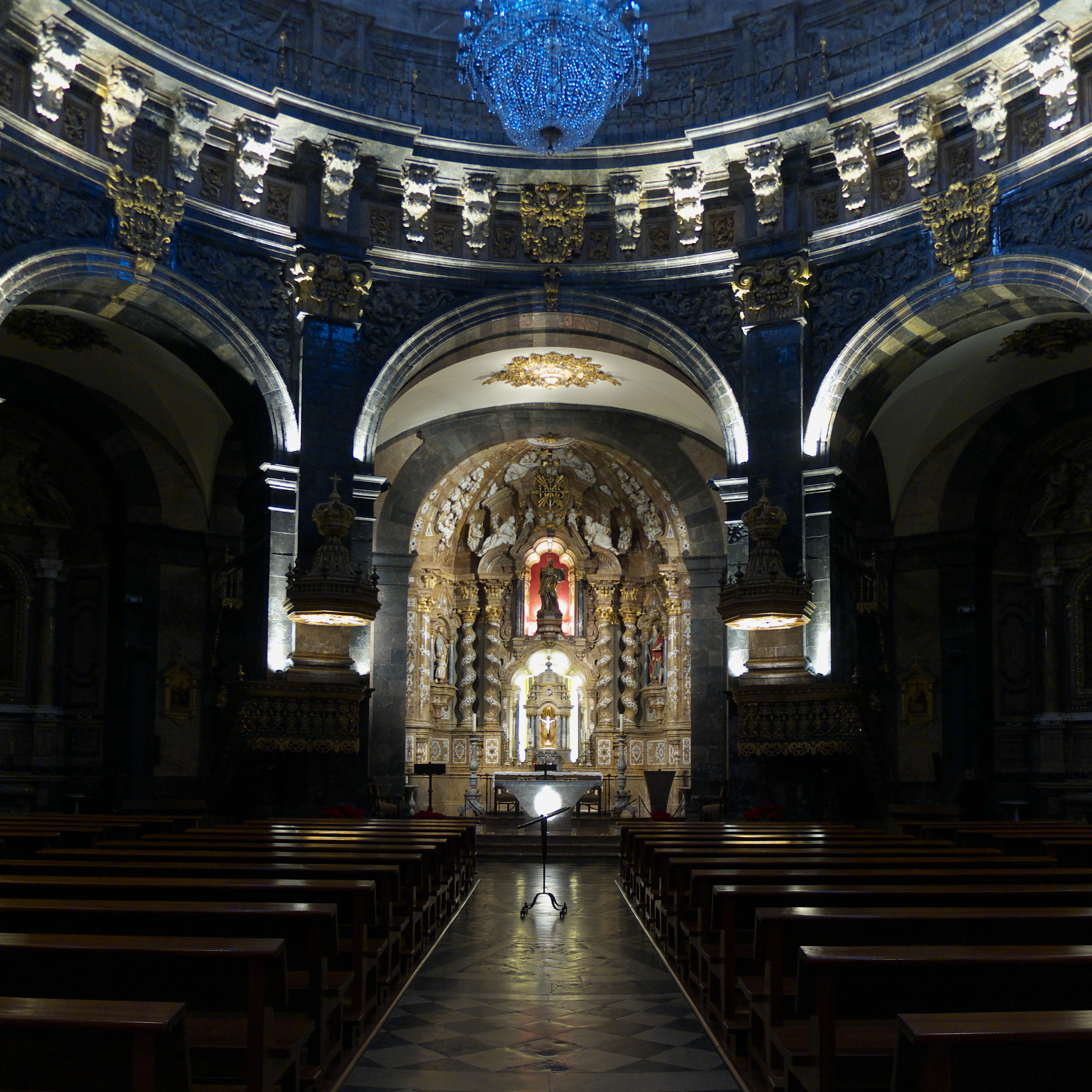 Interior de la basílica. El altar mayor presidido por la imagen de San Ignacio. Ignacio Ibero Erquicia realizó la obra entre los años 1750-1757 continuando el estilo churrigueresco.